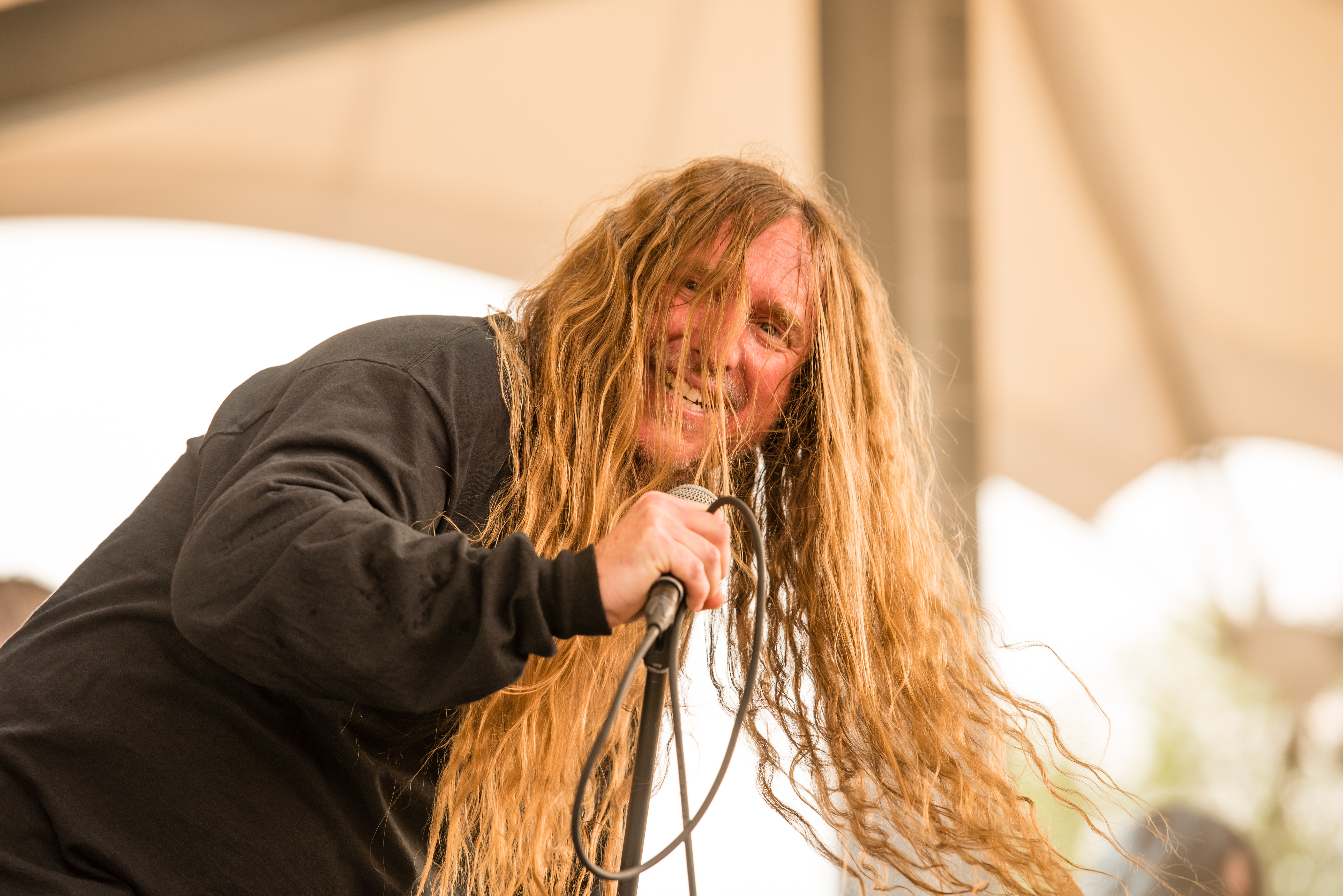 'Rock Hard Festival 2014 - Gelsenkirchen': 'Obituary'